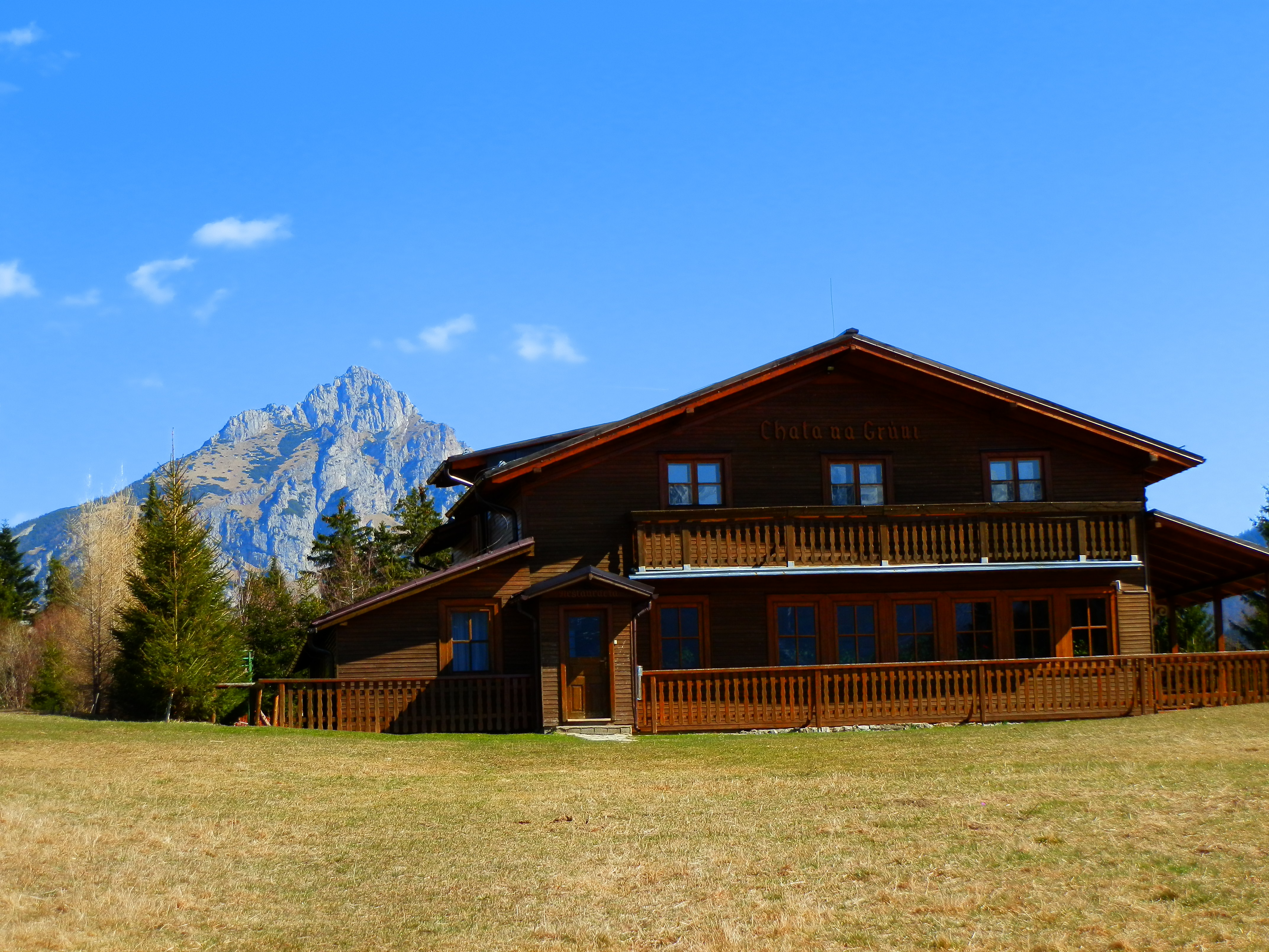 Chata na Grúni